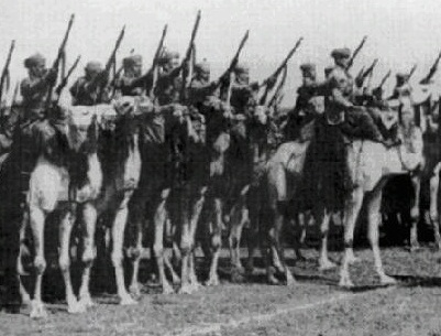 Foto digital de imagen de Spahis de la Libia italiana, montados en camello. Imagen de libro sobre colonias italianas, hecha en 1940 y modificada con mi sofware.